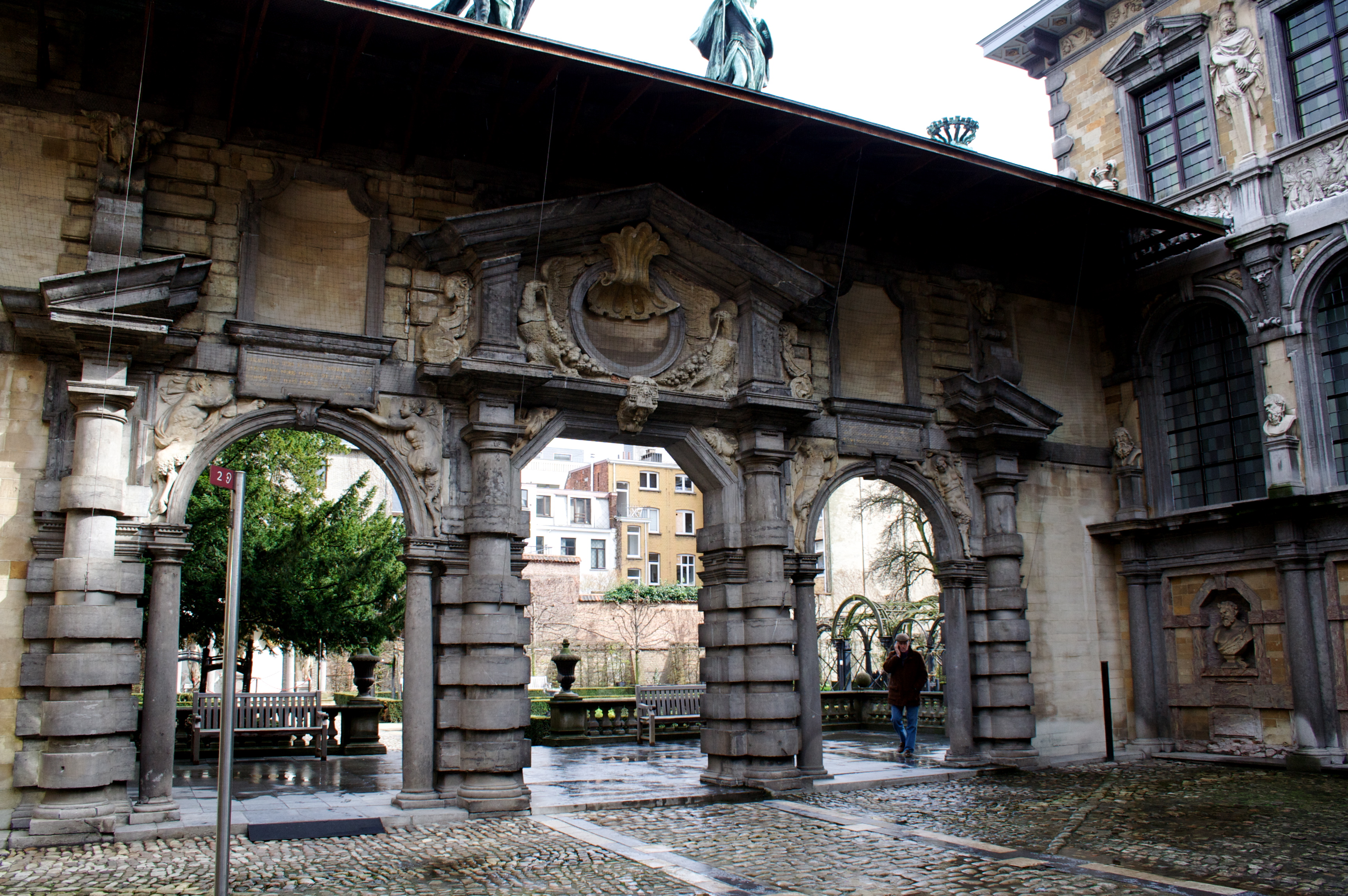 Casa-taller de Rubens en Amberes ( Antwerpen ). Pórtico barroco